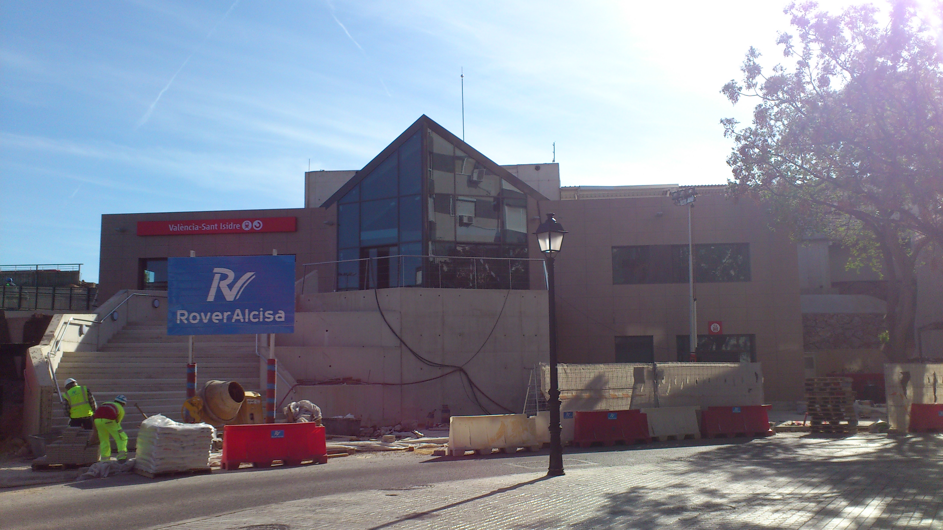 Nueva estación intermodal de València-Sant Isidre para las líneas C3 y C4 de Cercanías Valencia y líneas 1 y 5 de MetroValencia.